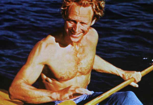 Gert Fredriksson, kanotist